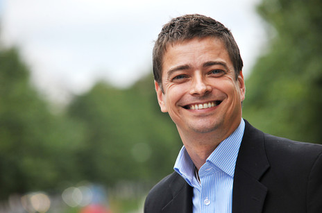 Jyrki Konola. Summer 2011. Tampere: Hämeenpuisto